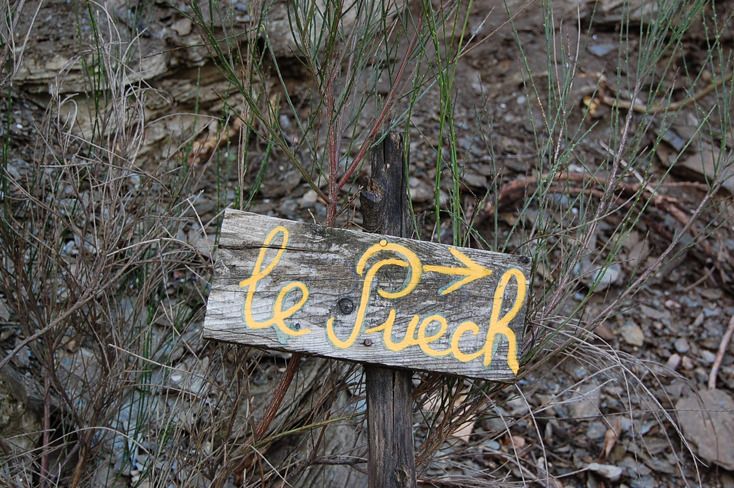 Walon: plake "Le Puech", hamtea di Sinte-Croes-Vå-francike (dipårtumint del Lozere)